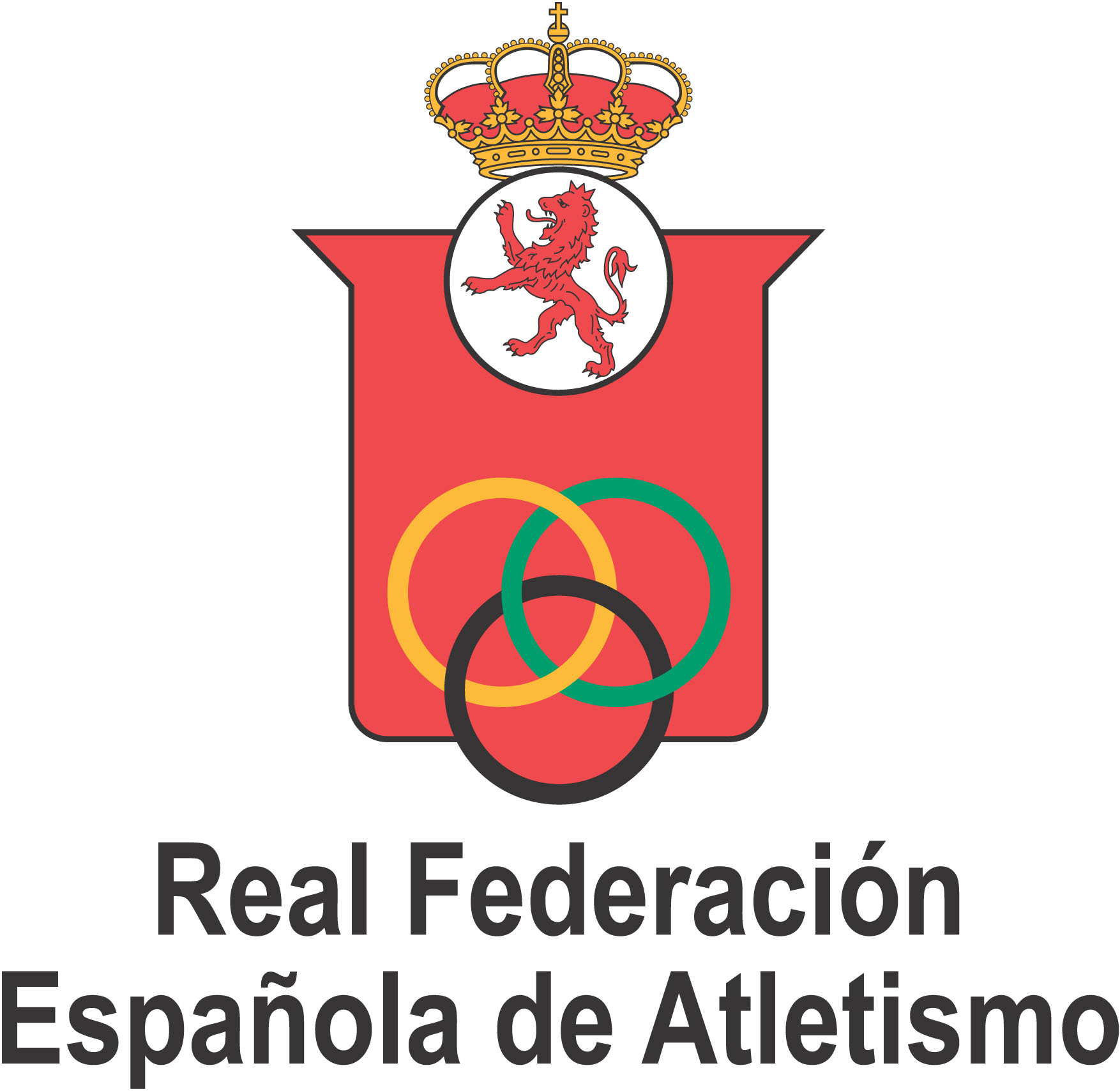 Logotipo oficial de la RFEA